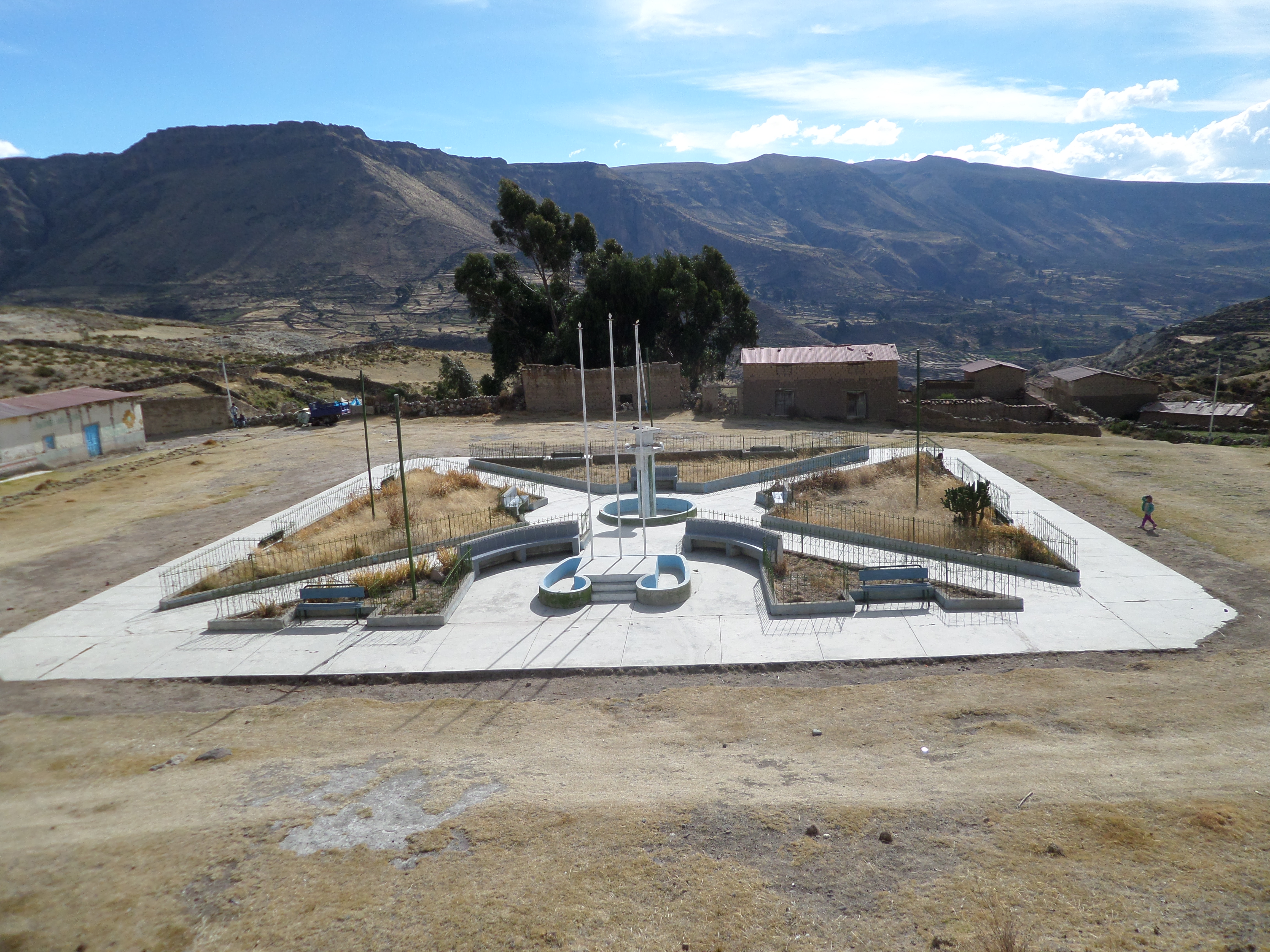 Plaza de Huaccracca